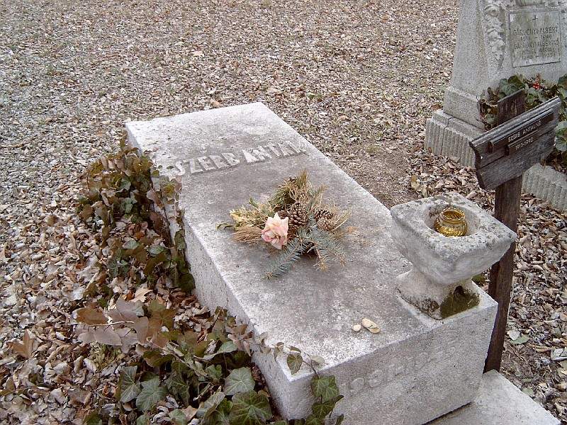 Szerb Antal (Bp., 1901. máj. 1. – Balf, 1945. jan. 27.) irodalomtörténész, író, esszéista sírja a budapesti Kerepesi temető 24-1-77 sírhelyén.